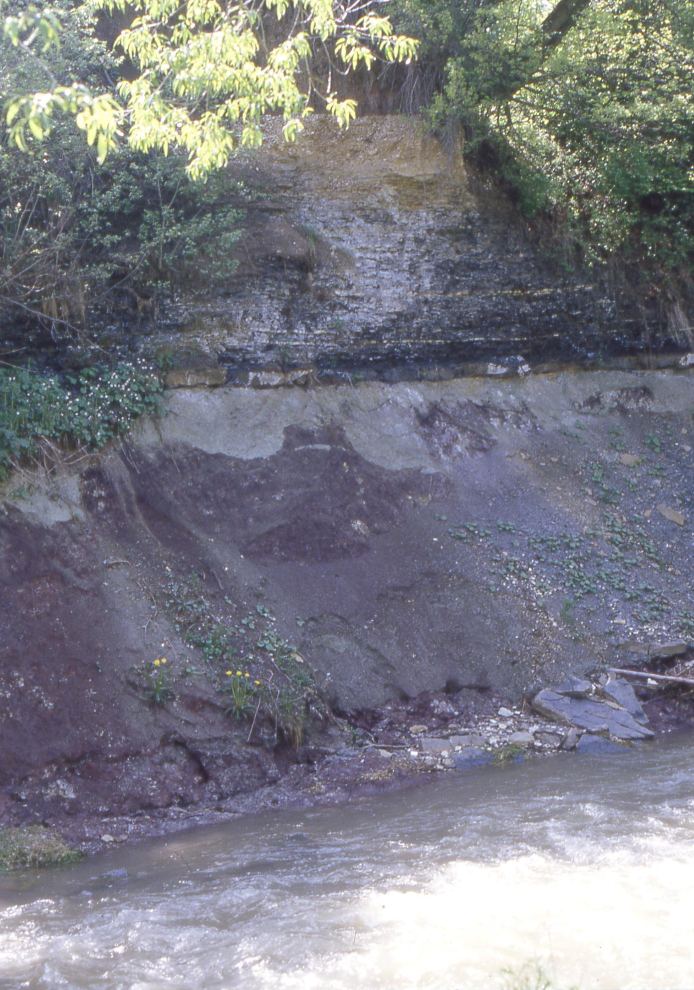 Grenzaufschluss zwischen Exter-Formation (Lias alpha) und Trossingen-Formation (Knollenmergel) an einem Prallhang der Starzel bei Hechingen-Stein.